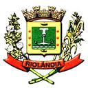 Brasão da cidade de Riolândia, SP